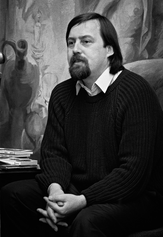 Jürgen Fuchs, Gymnasium Saalfeld 1990, Foto: Kai Ammon